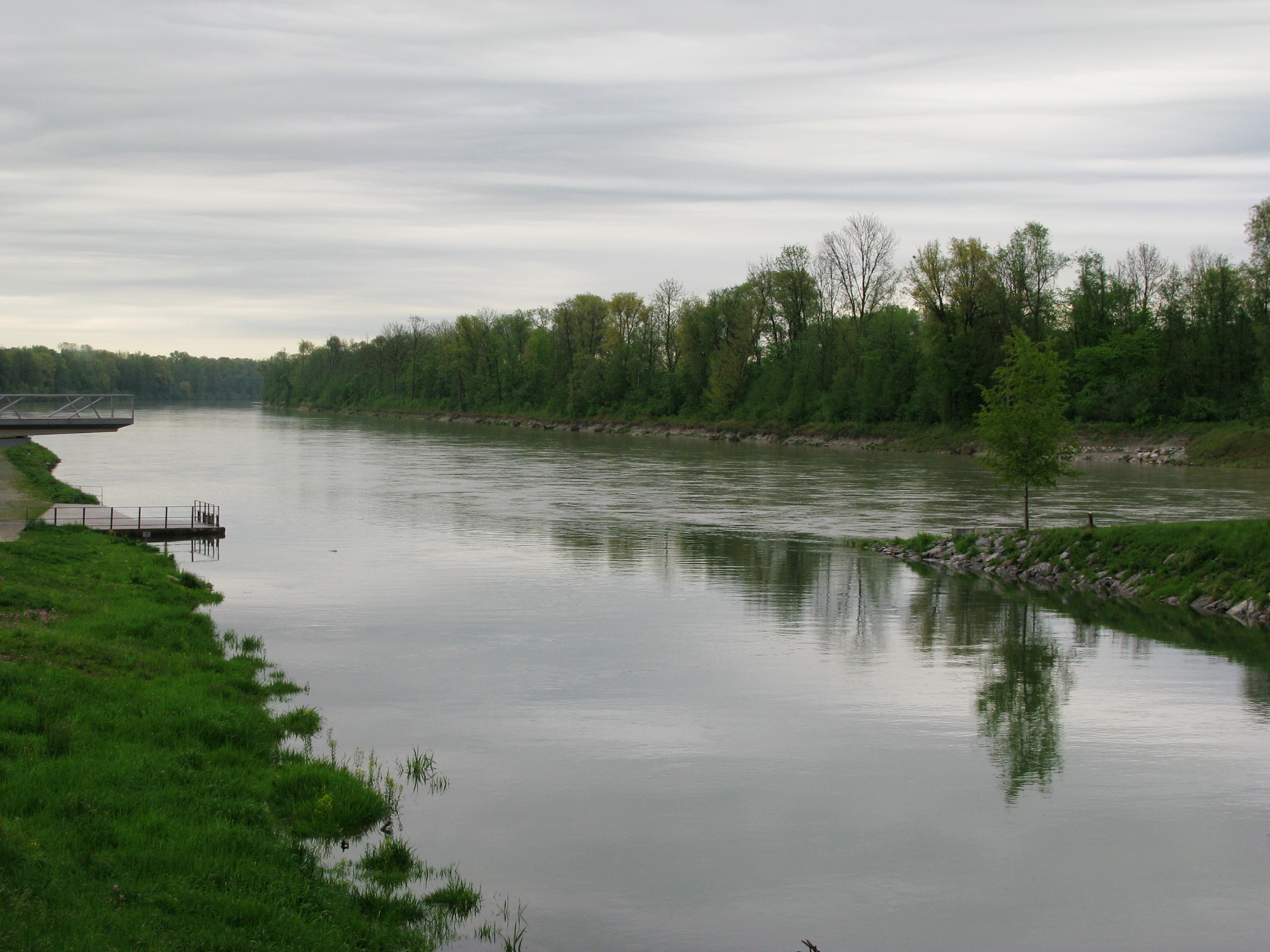 Mündung der Mangfall (im Bild vorne rechts) in den Inn (Bildmitte) bei Rosenheim.